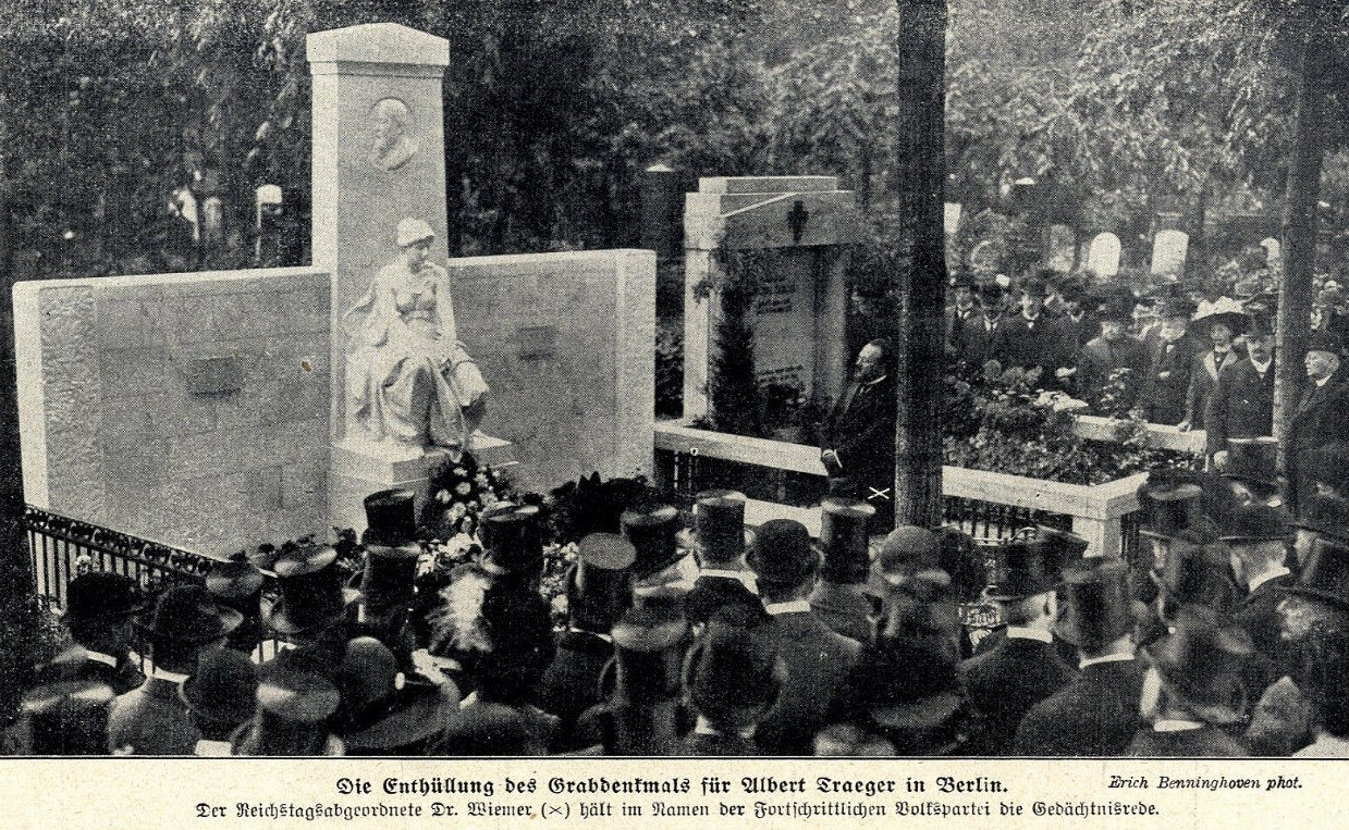 Die Enthüllung des Grabdenkmals für Albert Traeger in Berlin auf dem Dreifaltigkeitskirchhof II. Der Reichstagsabgeordnete Dr. Otto Wiemer (X) hält die Gedächtnisrede